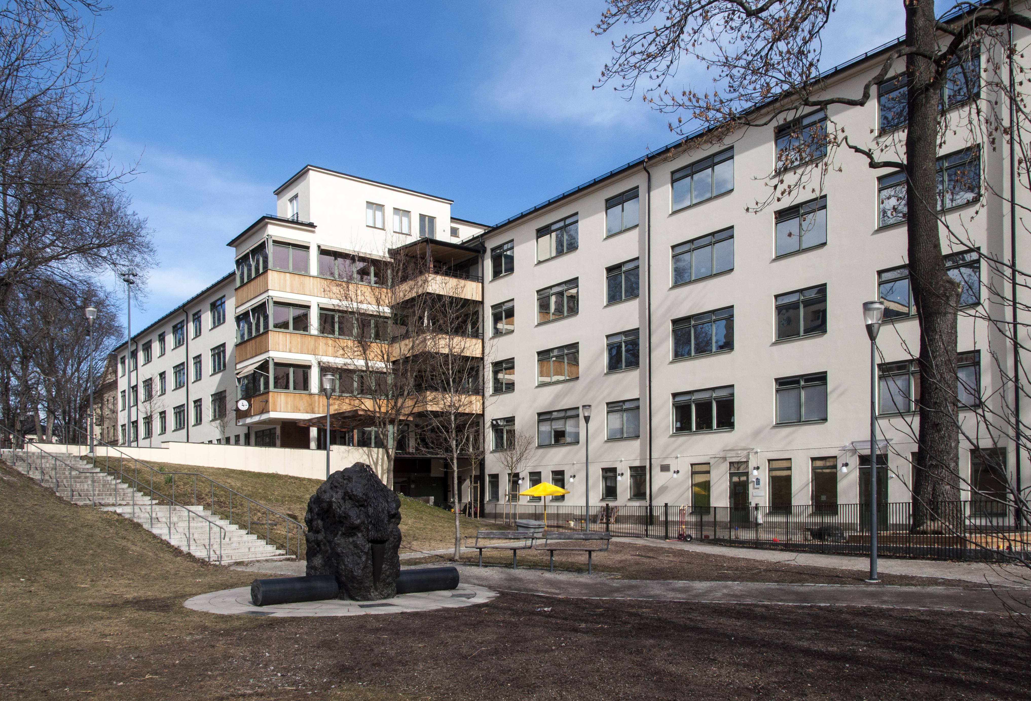 "Nya vårdhemmet", Sabbatsberg, Eastmansvägen 29-33, Torsgränd 31-33, Nybyggnadsår 1940 - 1942, Nils Sterner (Arkitekt), Sabbatsbergs Vård- och Ålderdomshem (Byggherre), Tore Virke (Arkitekt)